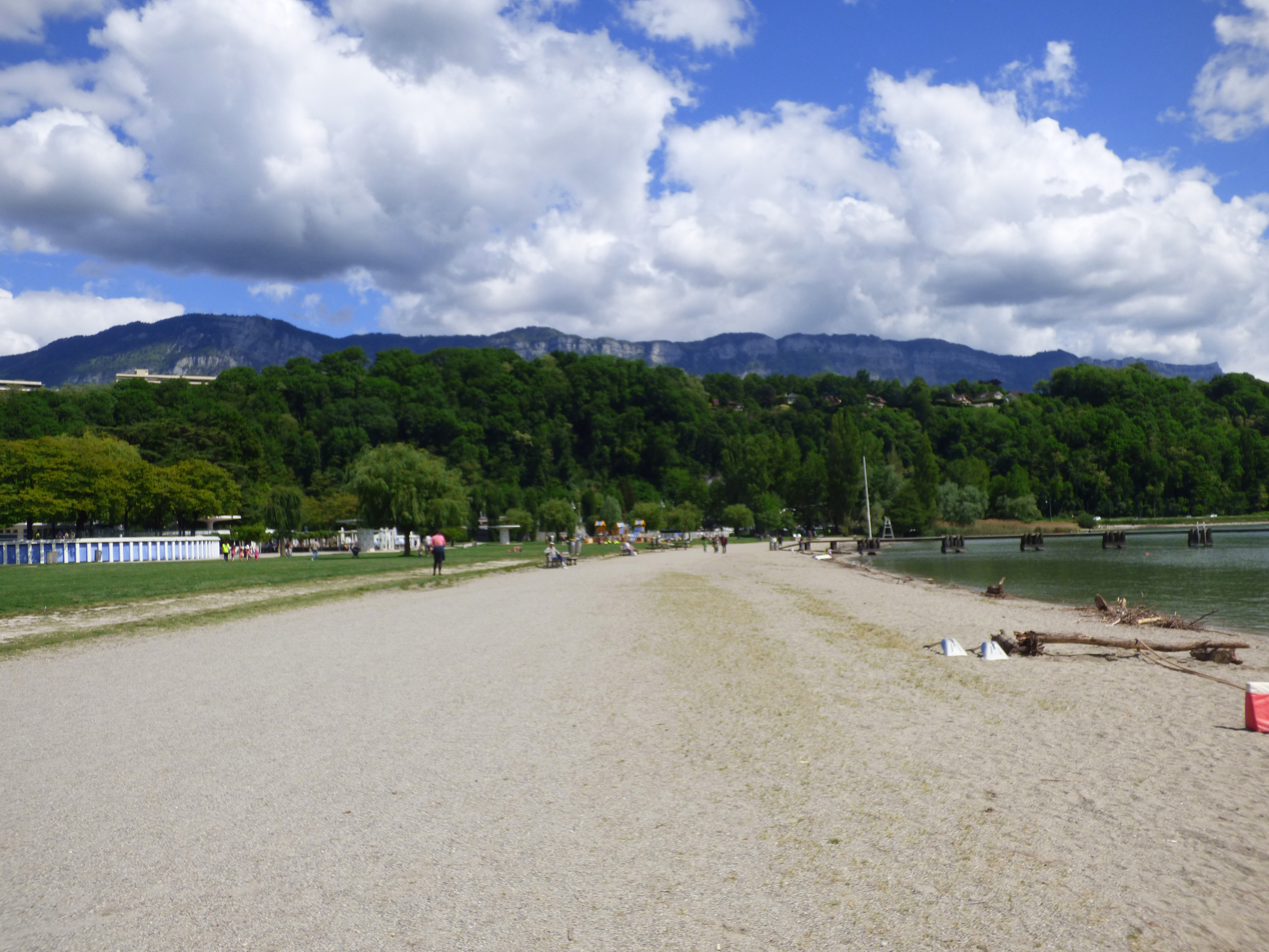 La plage d'Aix-les-Bains.